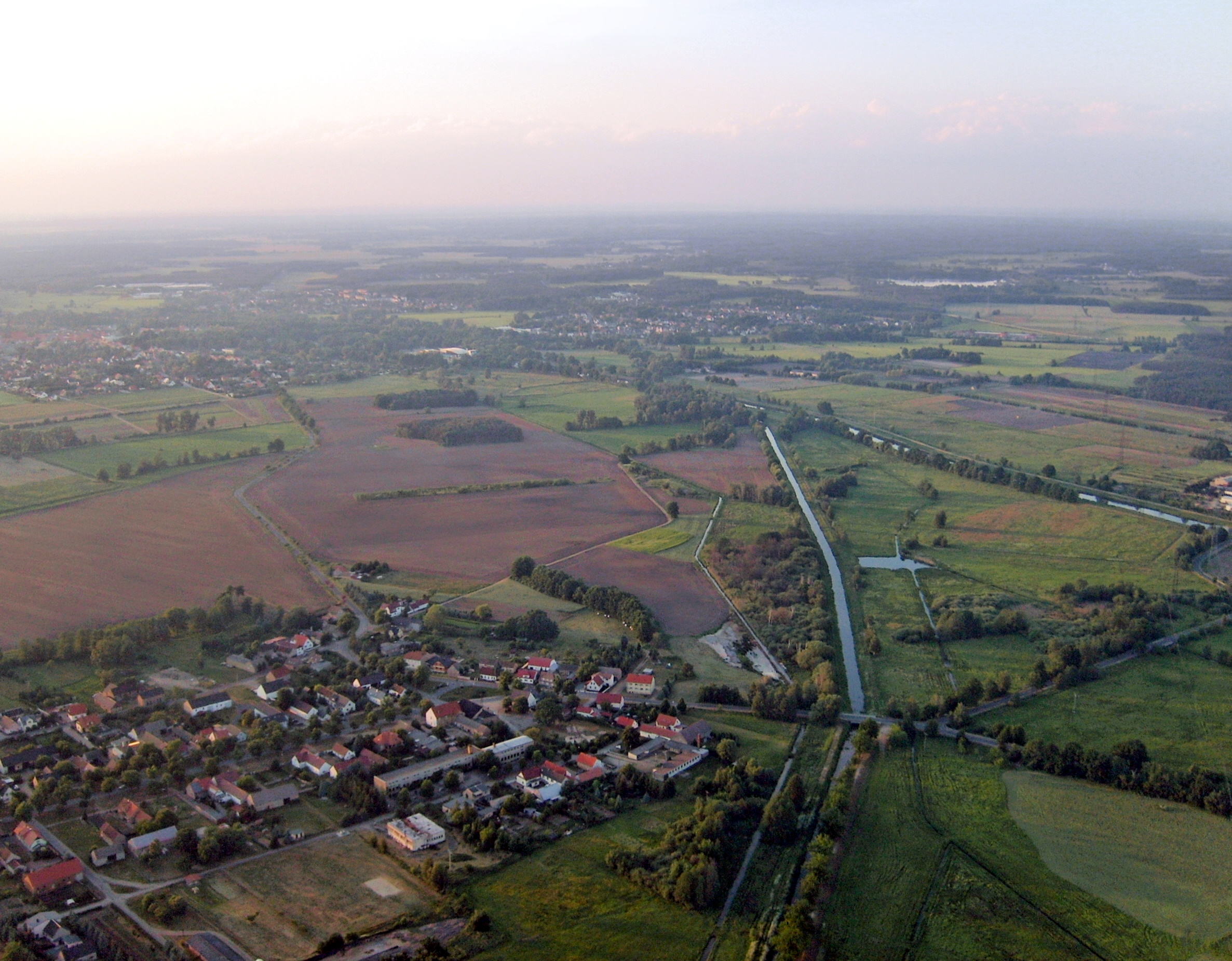 Zobersdorf und Bad Liebenwerda aus der Luft.